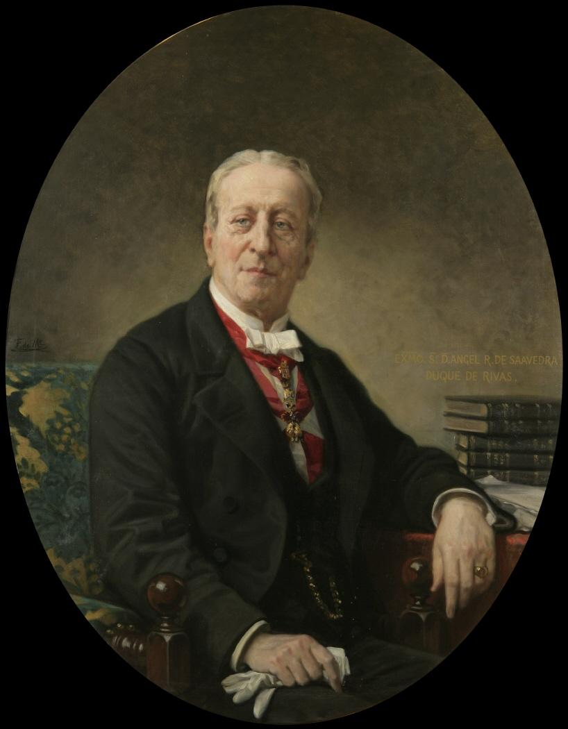 Retrato que representa al escritor, militar y político Ángel de Saavedra (1791-1865), duque de Rivas y grande de España. Su obra literaria más conocida es Don Álvaro o la fuerza del sino.